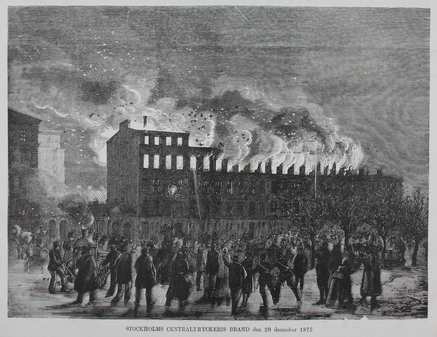 Centraltryckeriets brand 1875 - träsnitt i tidningen Hemvännen från 1876